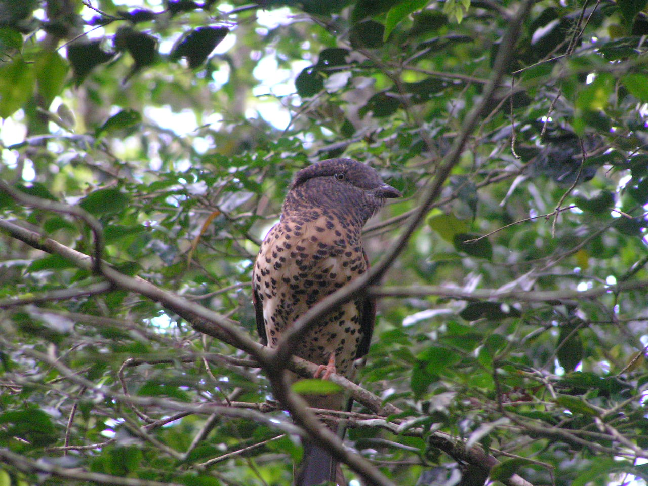 Cuckoo Roller (Leptosomus discolor)